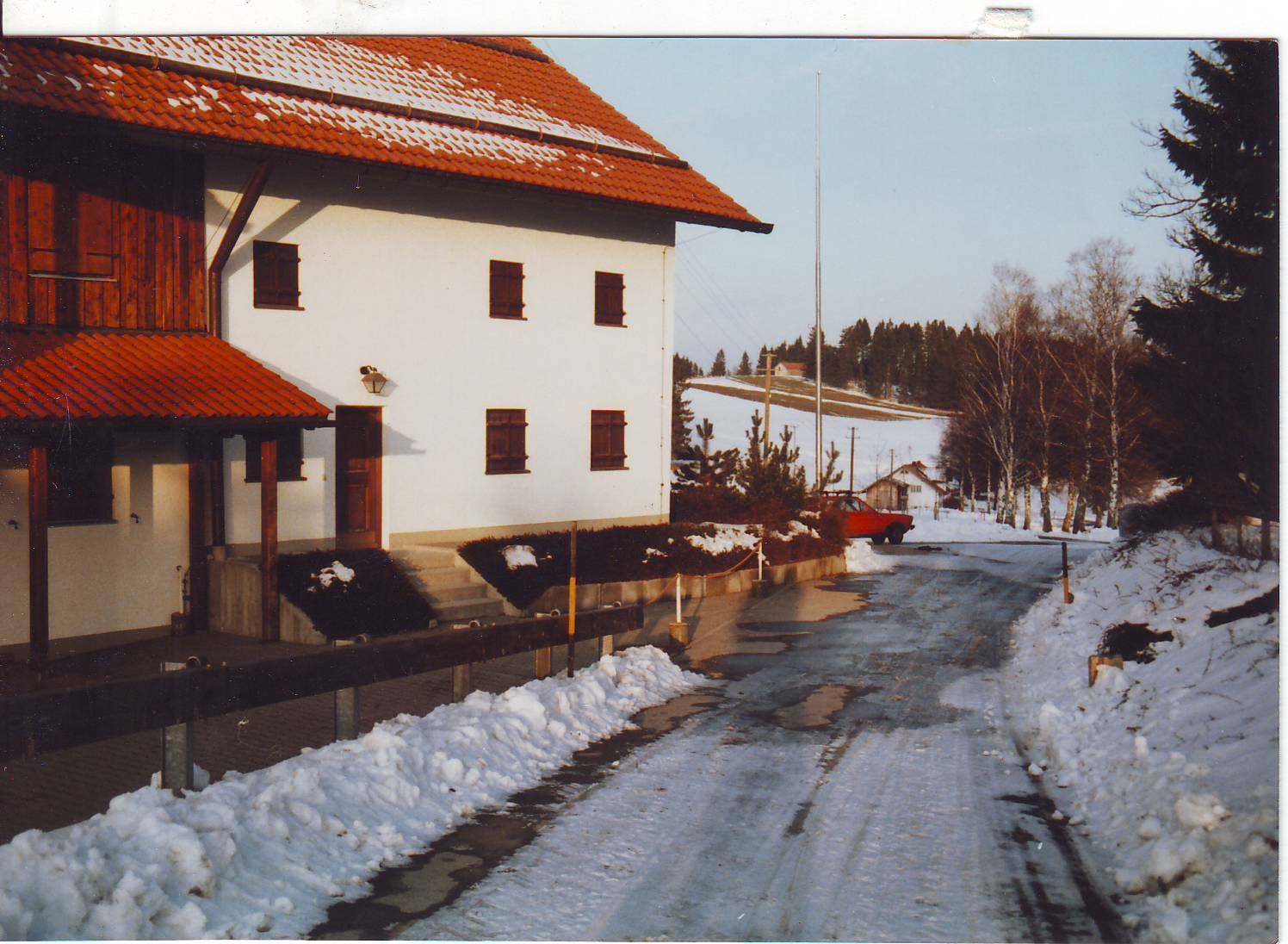 Oed im Hochwinter 1995